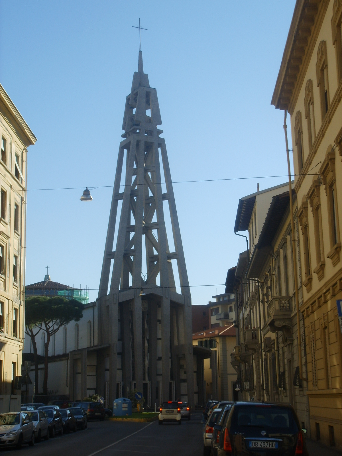 Chiesa_del_Sacro_cuore a Firenze